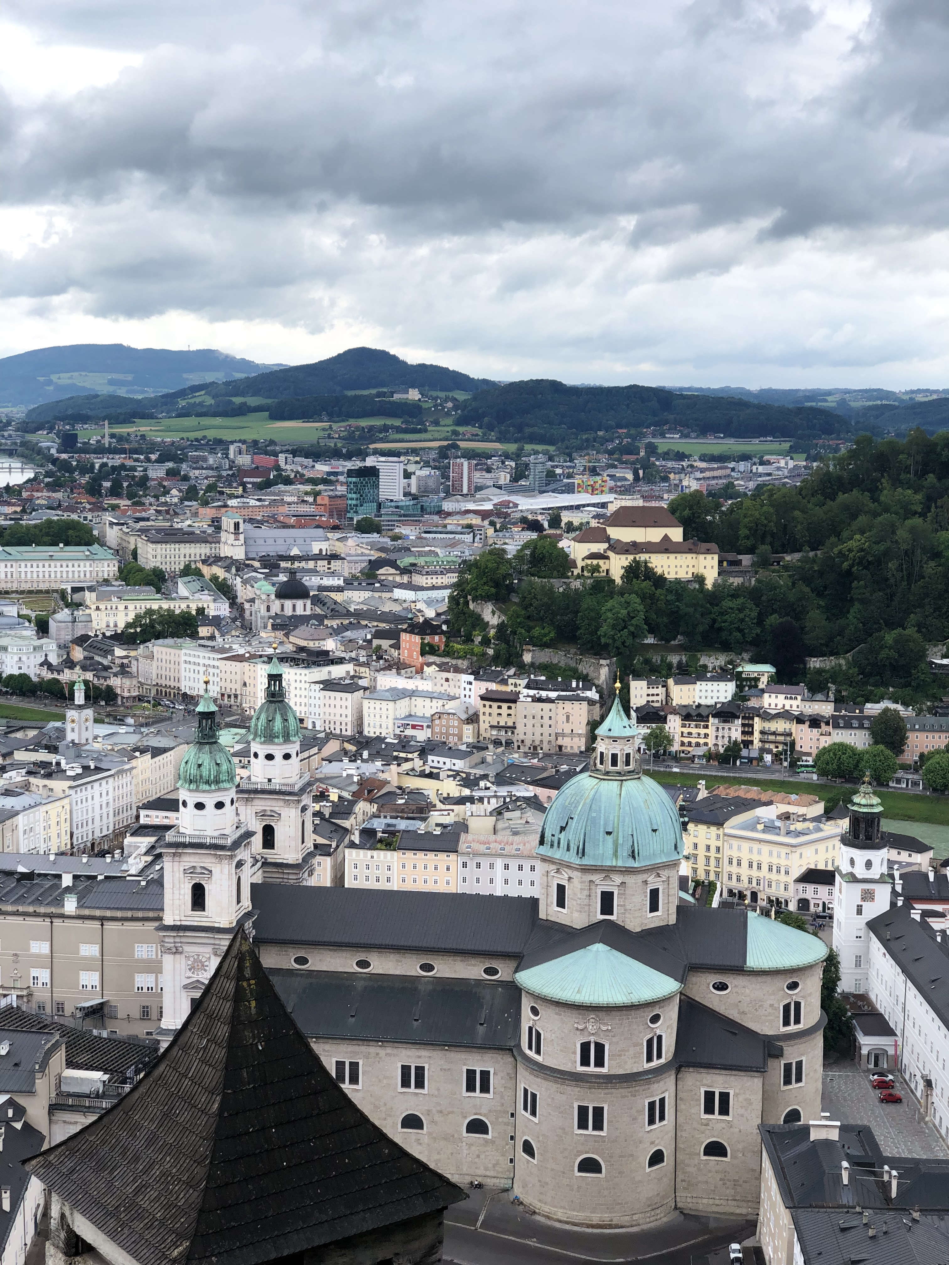 Tomada en Salzburgo en julio 2019